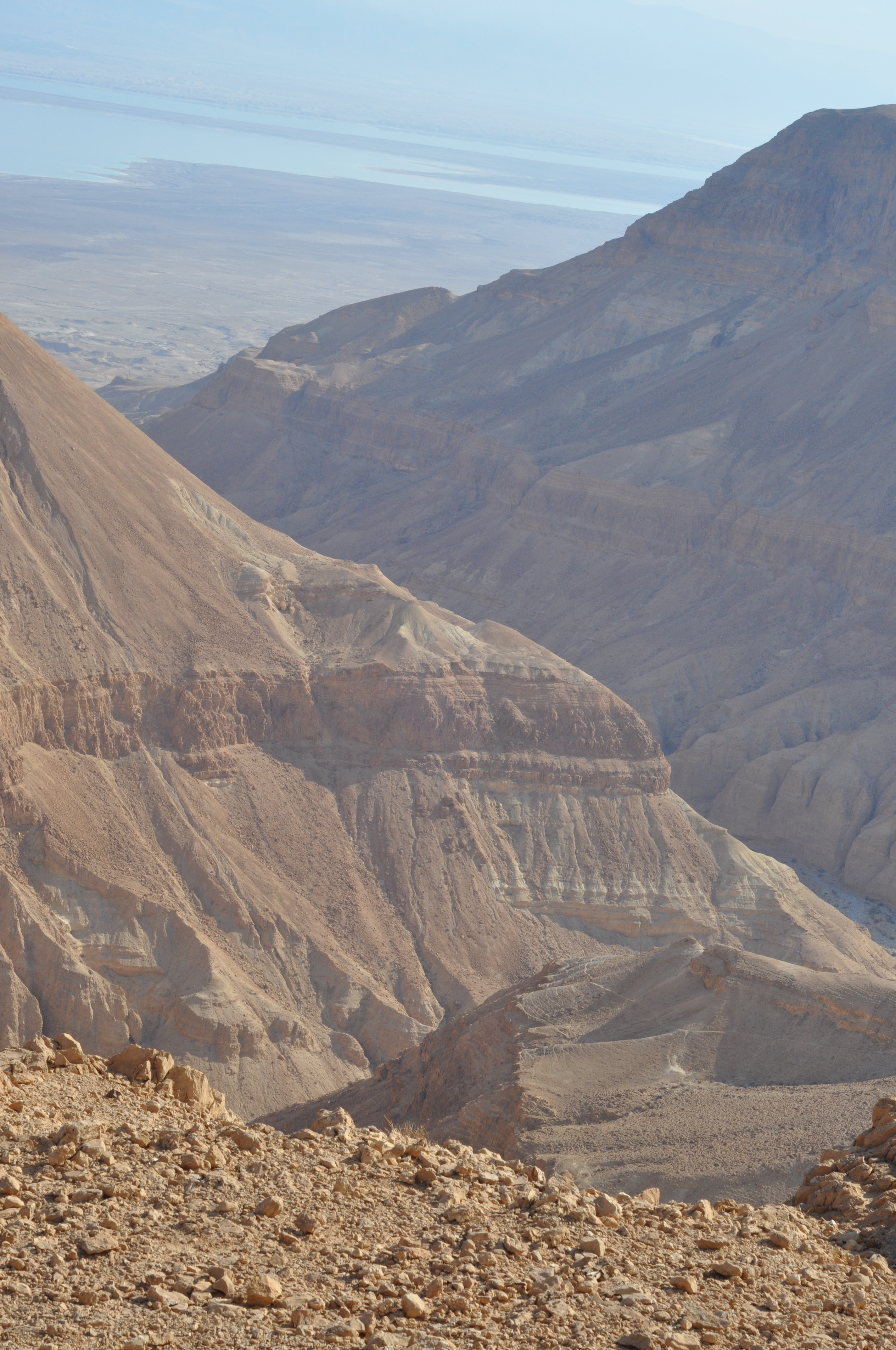 תצפית אל נחל חבר